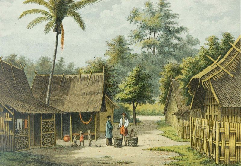 Litho. Kleurenlitho naar een oorspronkelijk werk van Rappard.. Een kampong op Java